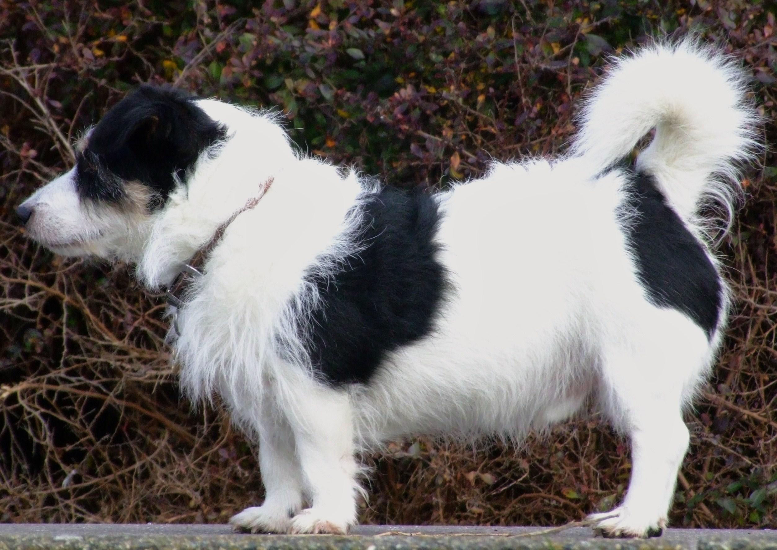 Jack Russell